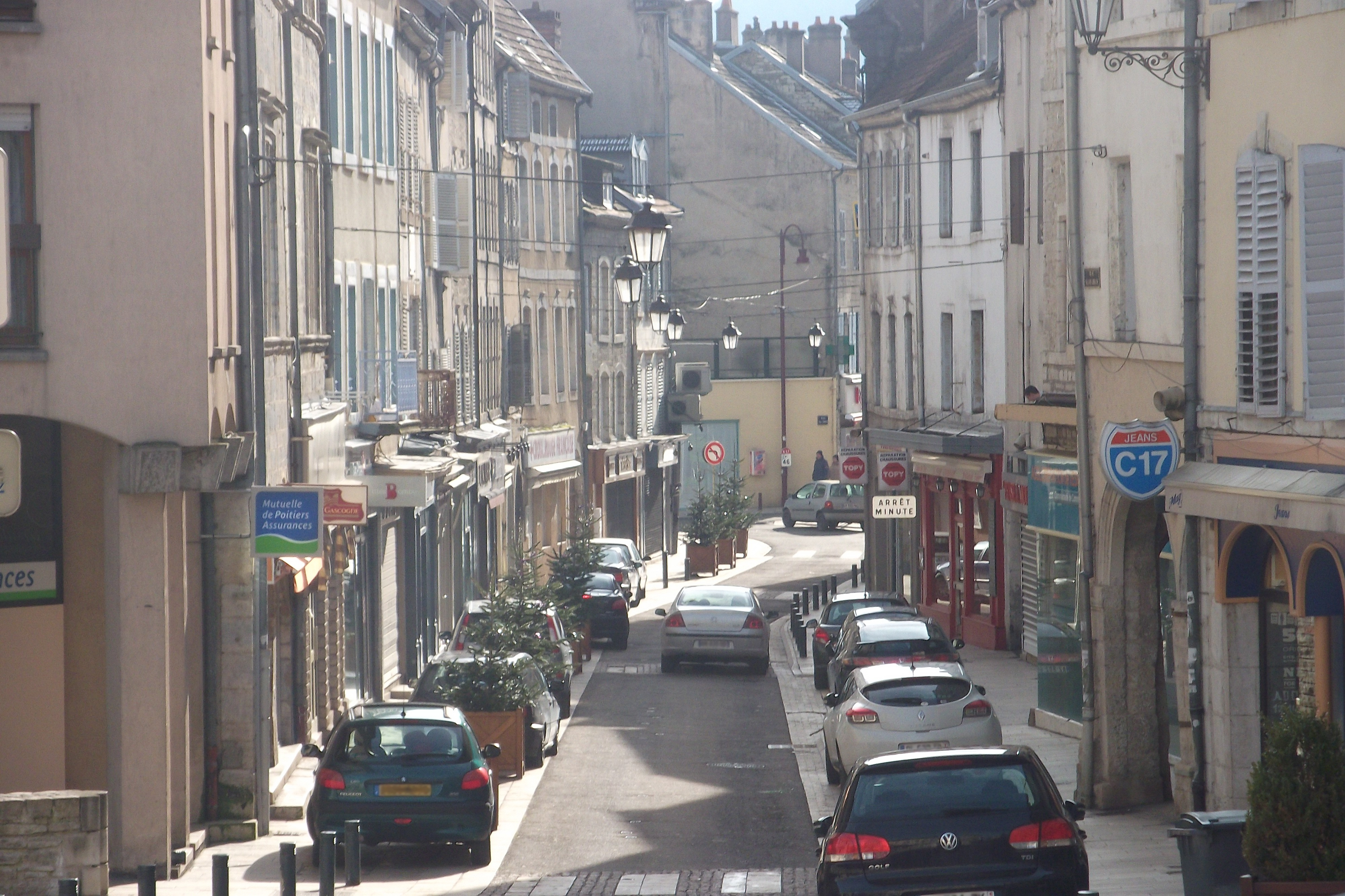 La rue d'Alsace-Lorraine de Vesoul